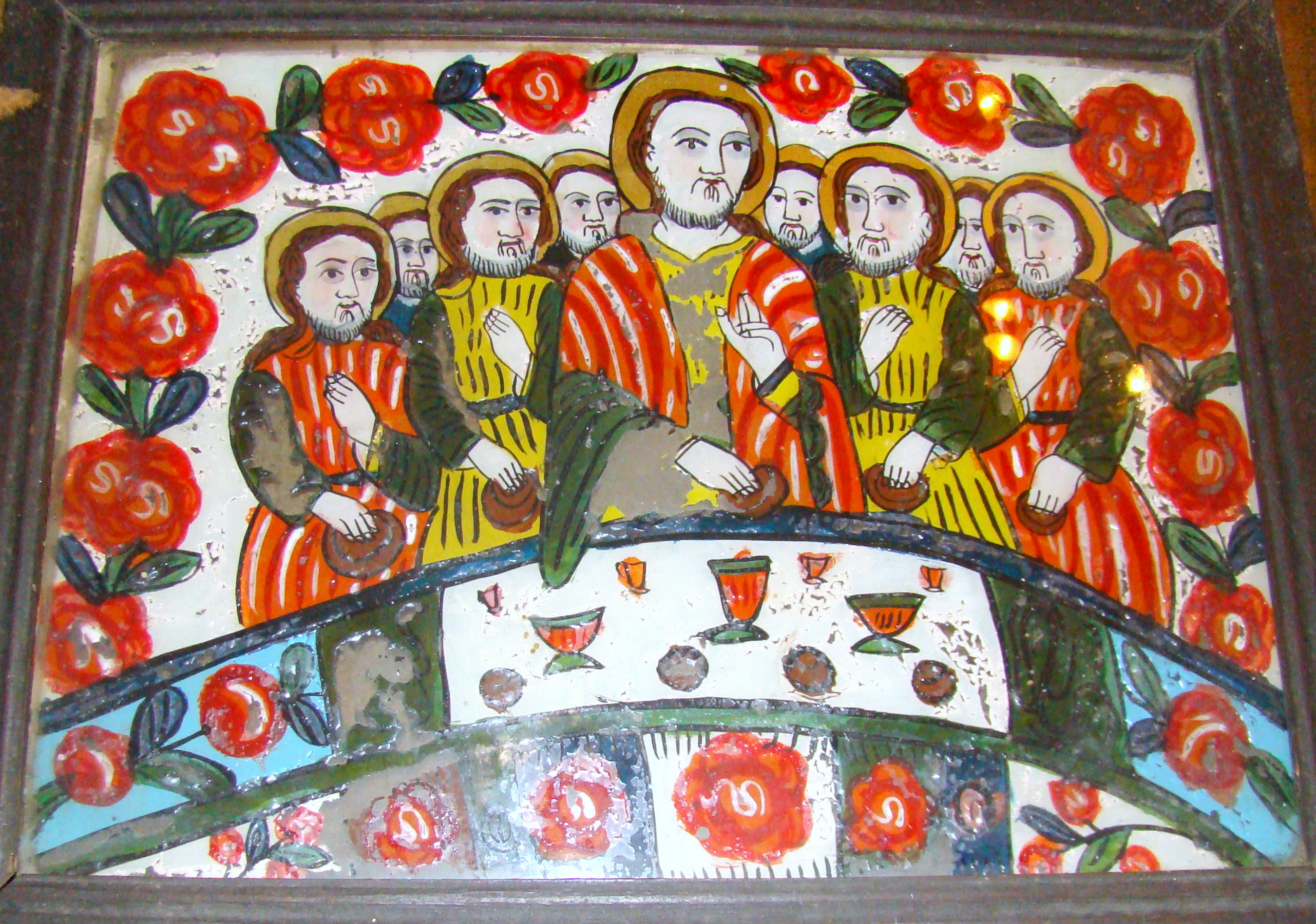 Biserica de lemn din Tinca, județul Bihor